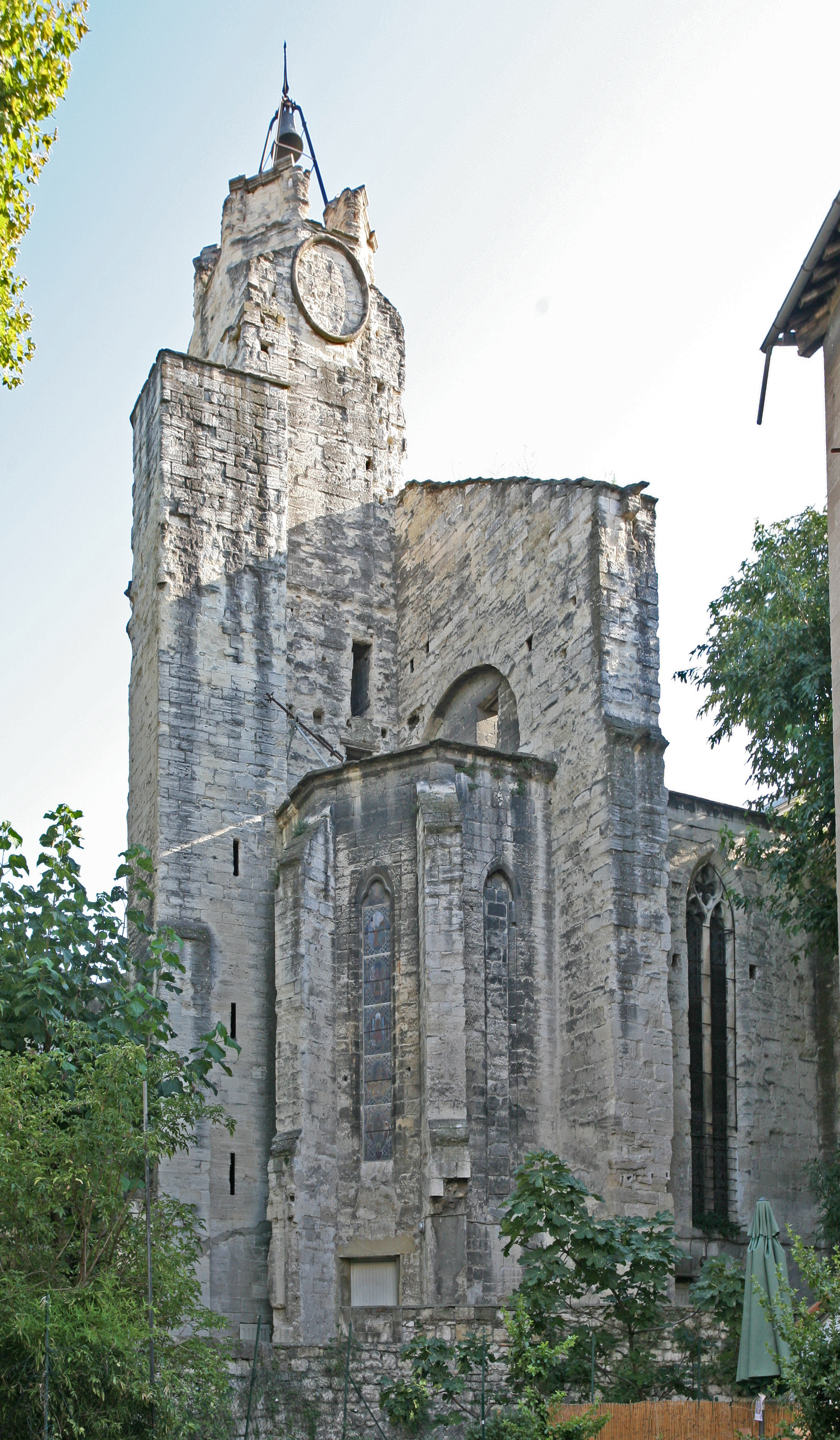 Ancienne chapelle des Cordeliers d'Avignon, Vaucluse, France (erreur titre de la photo)